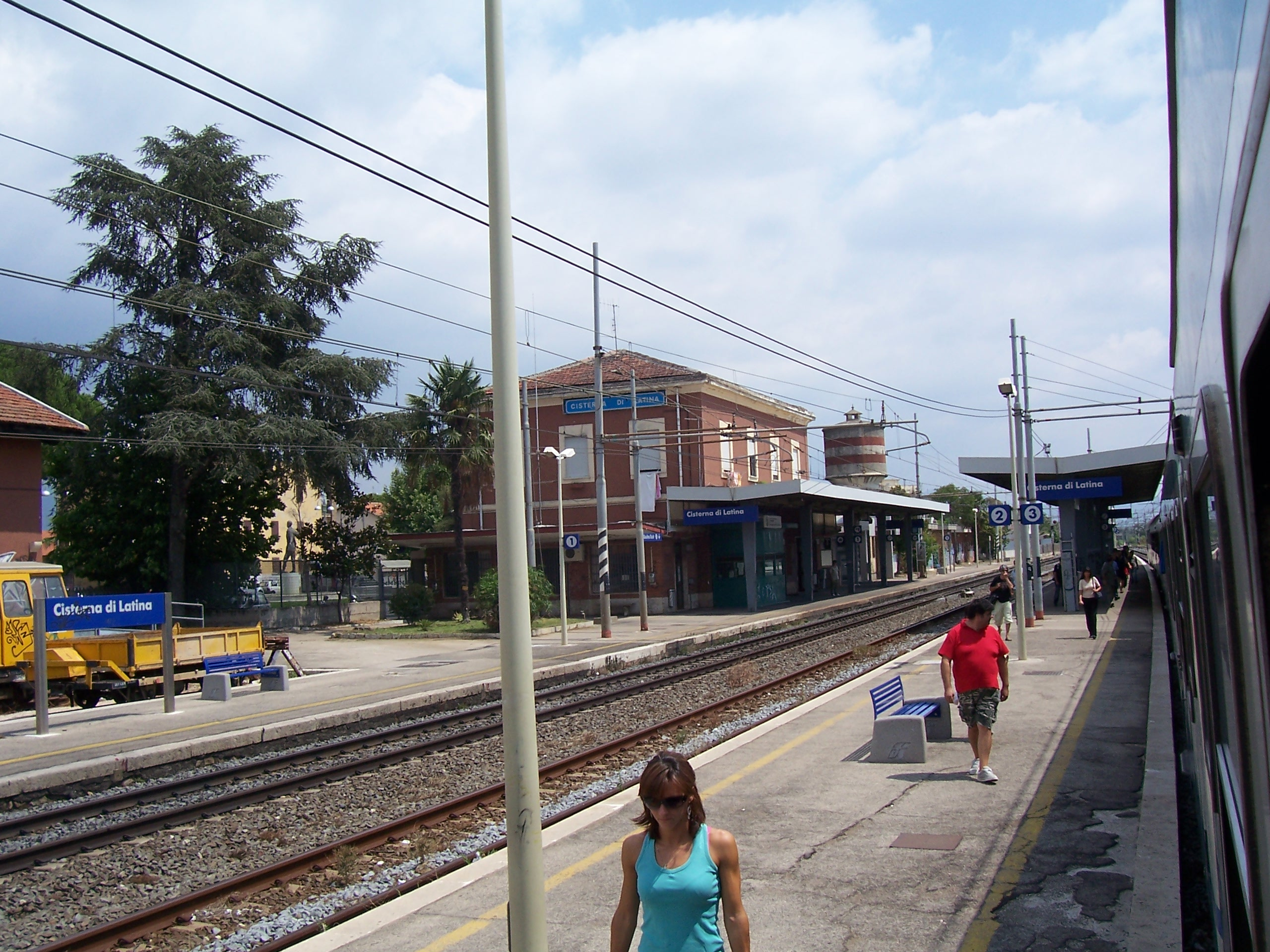 Cisterna di Latina (LT, Italy) train station - Stazione di Cisterna di Latina (LT)